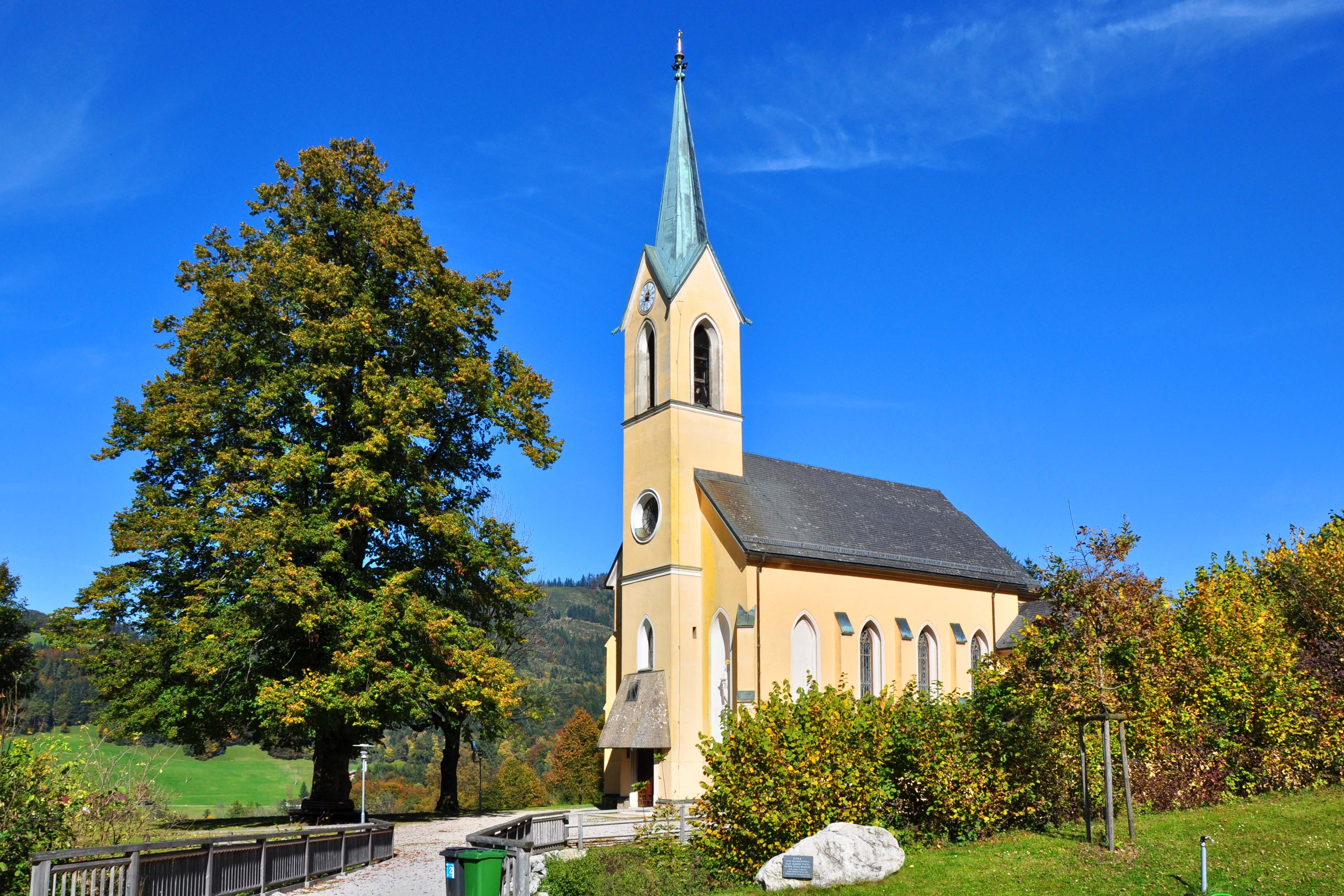 Filialkirche Guggenthal der Pfarre Koppl (Heiligkreuzkirche). Bis 2009 Filialkirche der Stadtpfarre Gnigl (Stadt Salzburg). Erbaut im neugotischen Stil vom Baumeister Valentin(o) Ceconi von 1863 bis 1864.